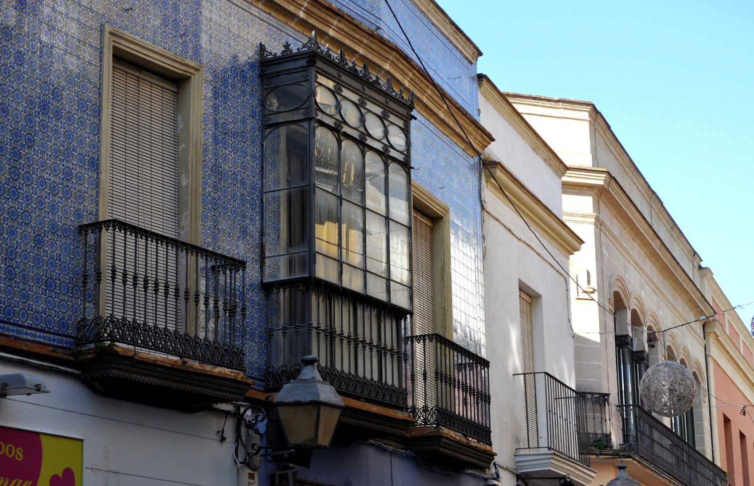 Azulejos en la Calle Algarve, Jerez de la Frontera